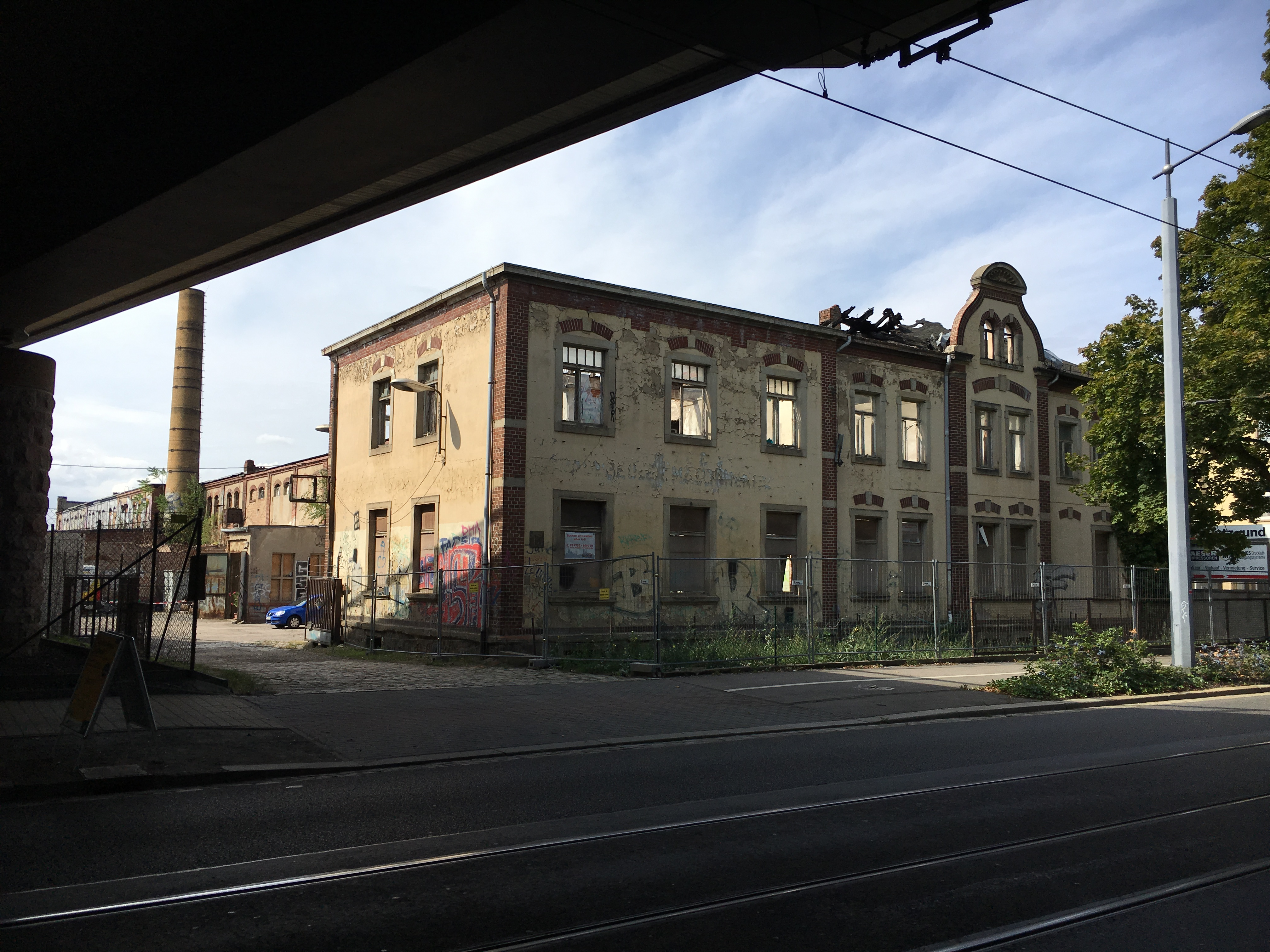 Radebeul, Zerma, Tag des offenen Denkmals 2019. Aufnahmen mit Genehmigung des Eigentümers und Gastgebers des TdoD.